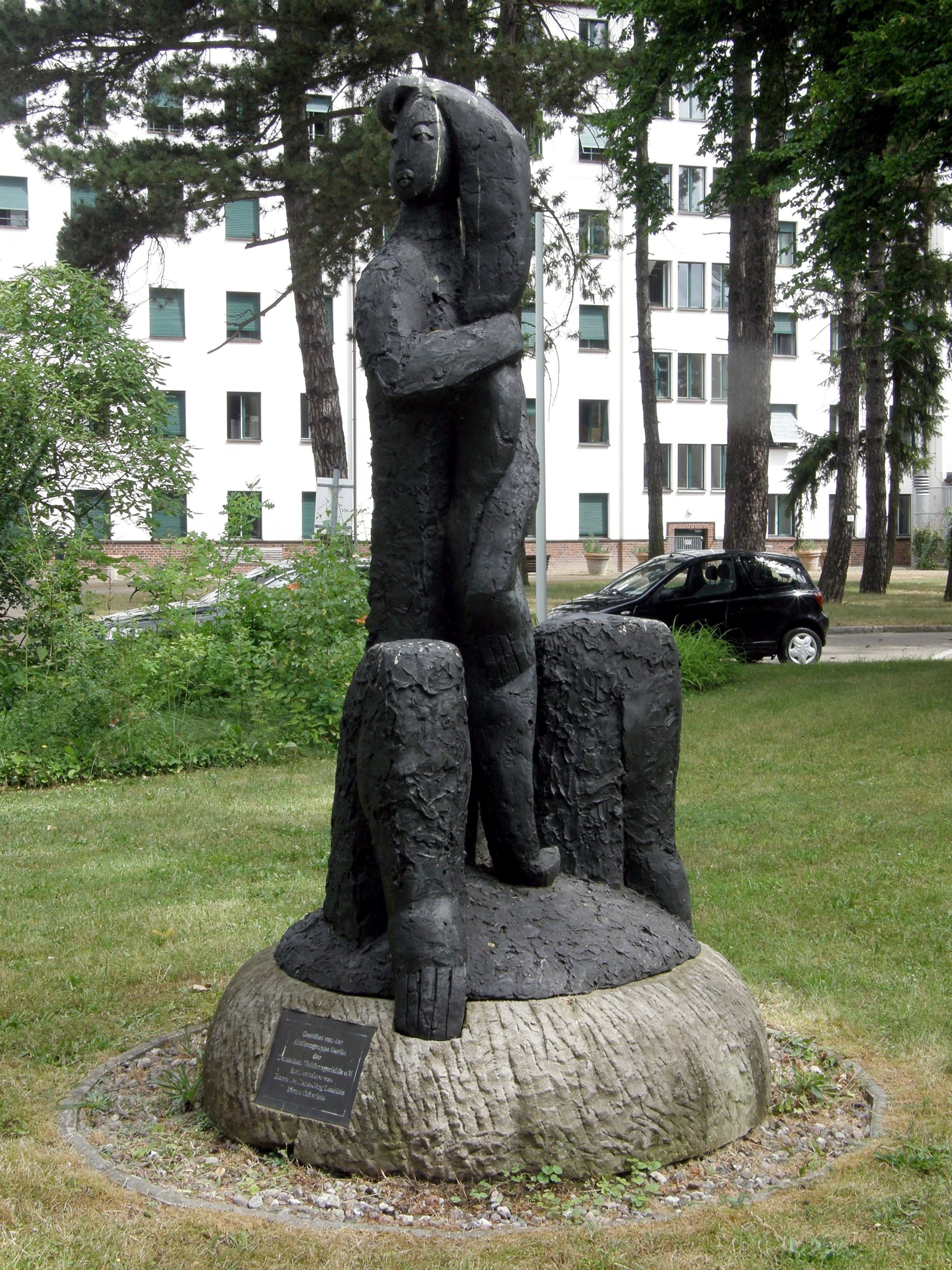 Skulptur "Hoffnung" von Jörg Steinert. Standort auf dem biomedizinischen Campus Berlin-Buch.